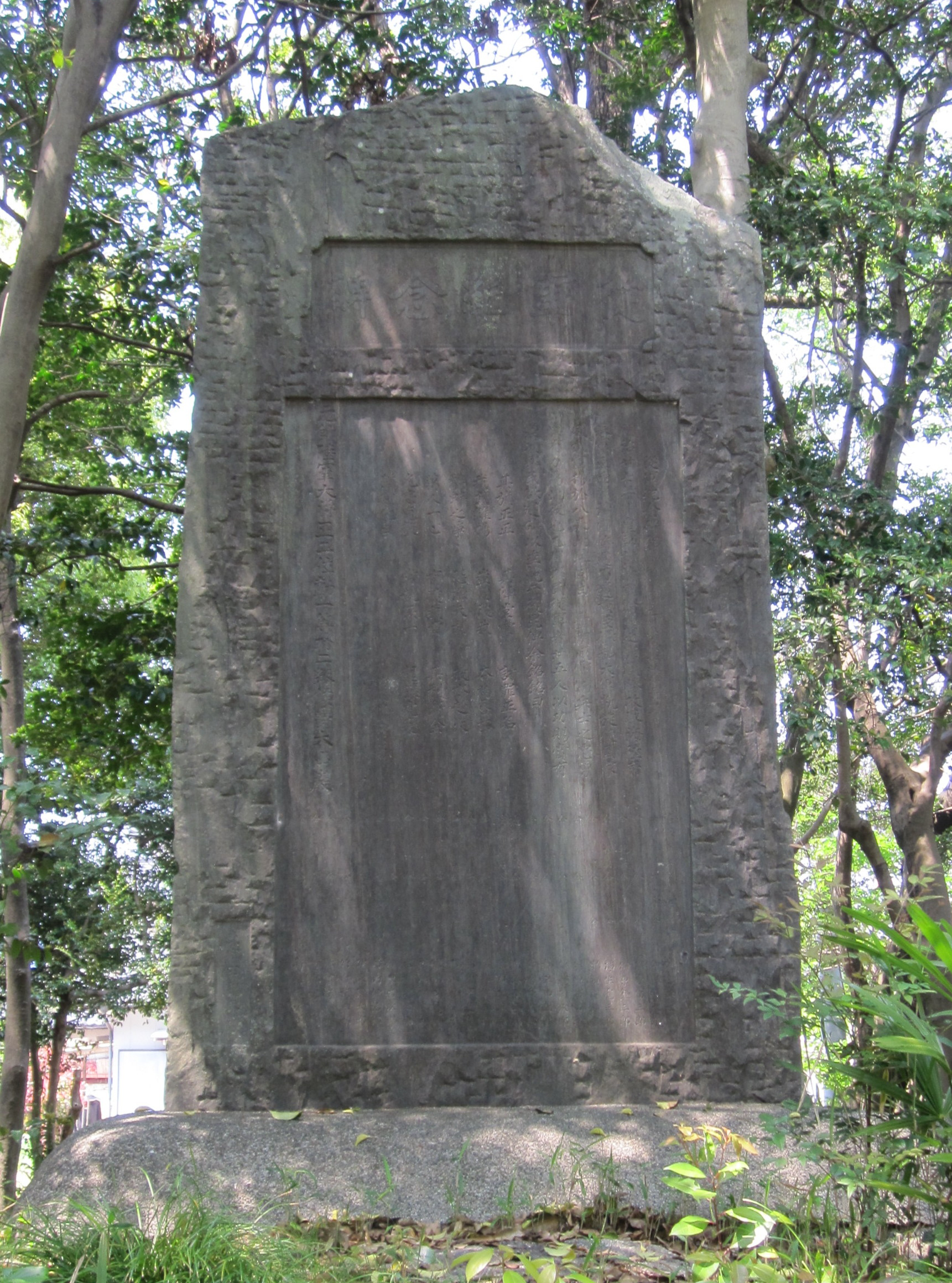 乙川村日清戦争従軍紀念碑、大山巌書。乙川白山公園にて保存用資料として撮影。